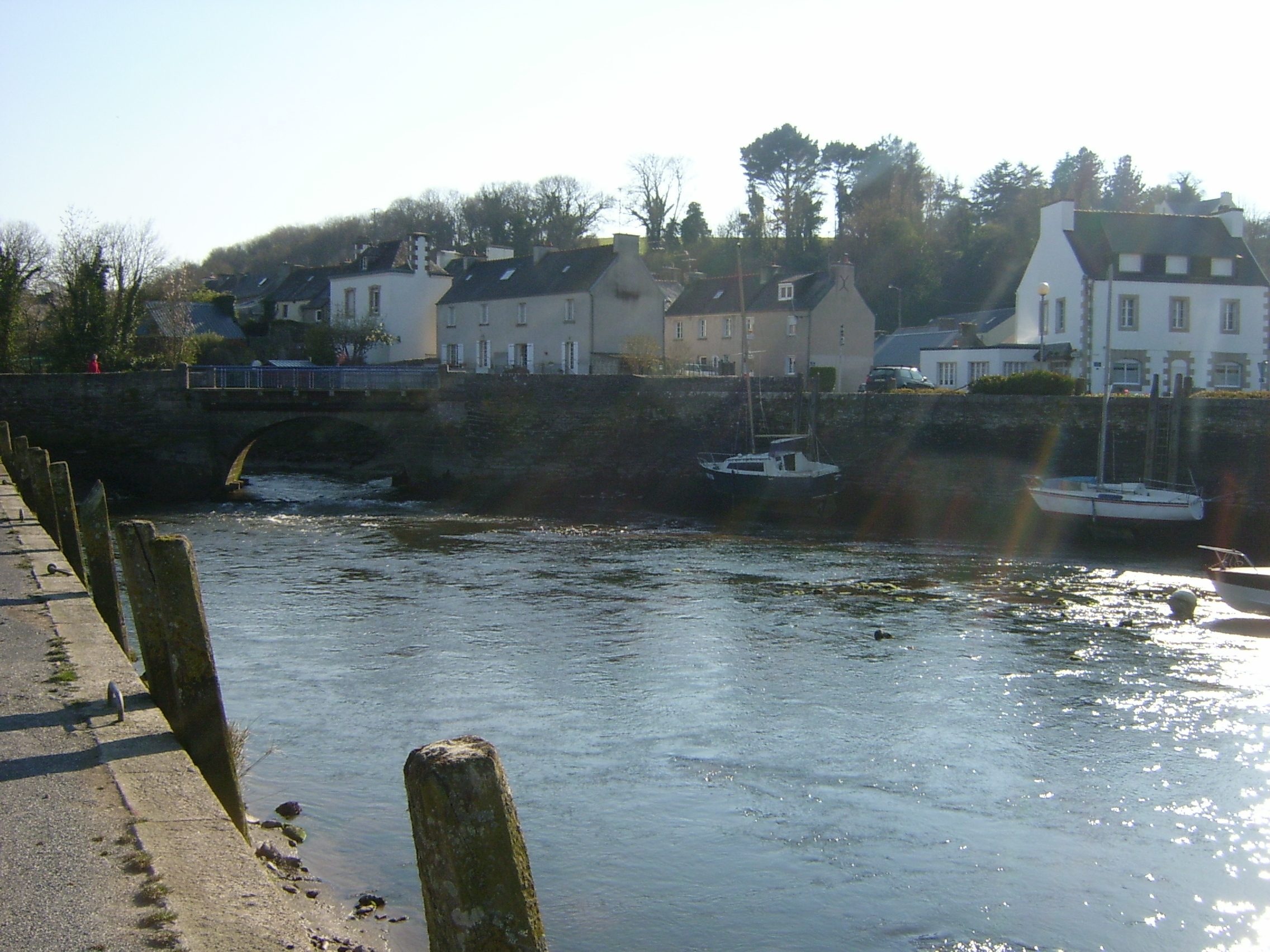 Auteur Kerlidec Le charmant petit port de Penzé Source :photo perso